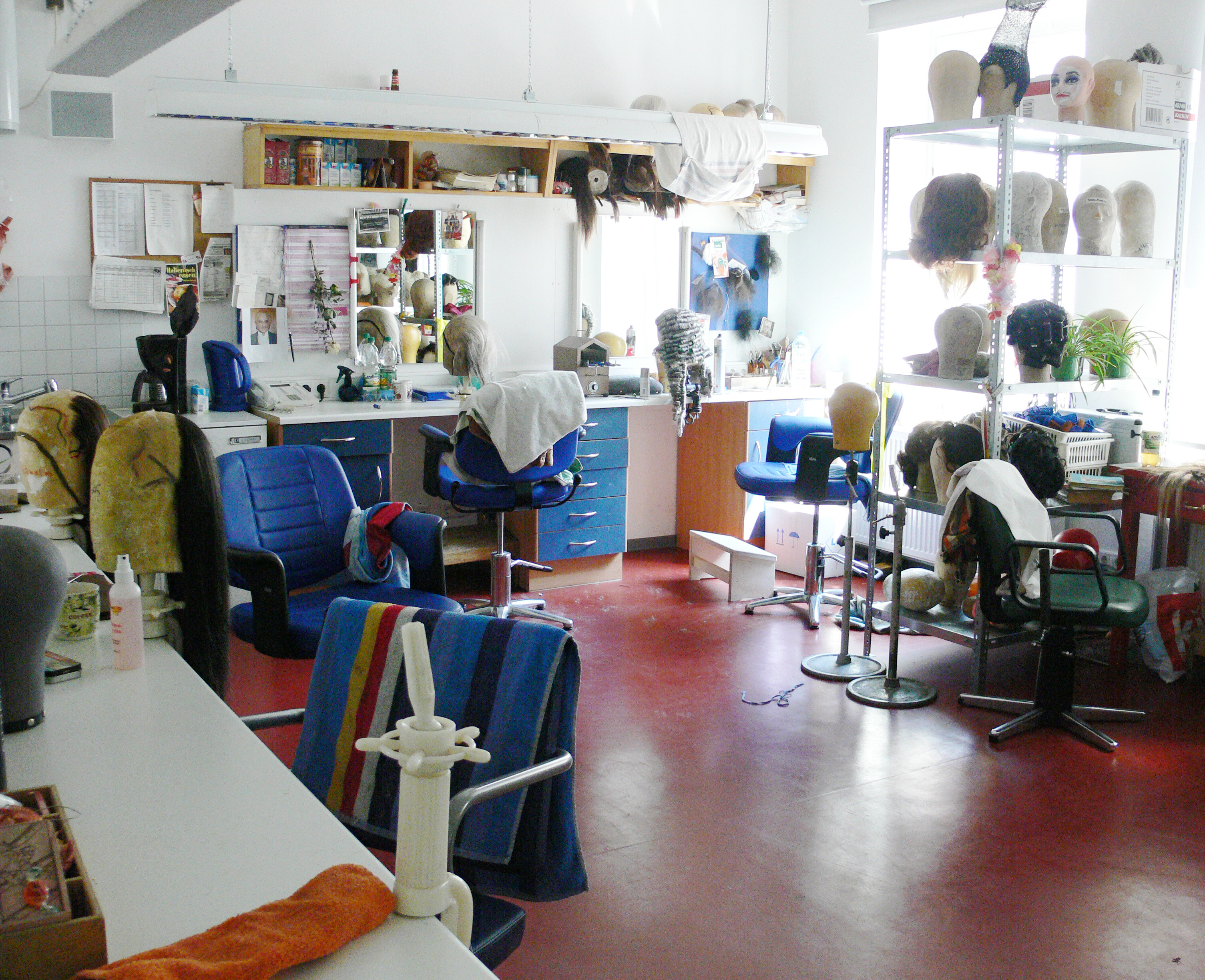 Theater Bielefeld, Maske (= Künstlerloge, Schminkraum im Theater)